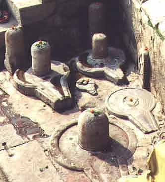 images de lingam et de yoni